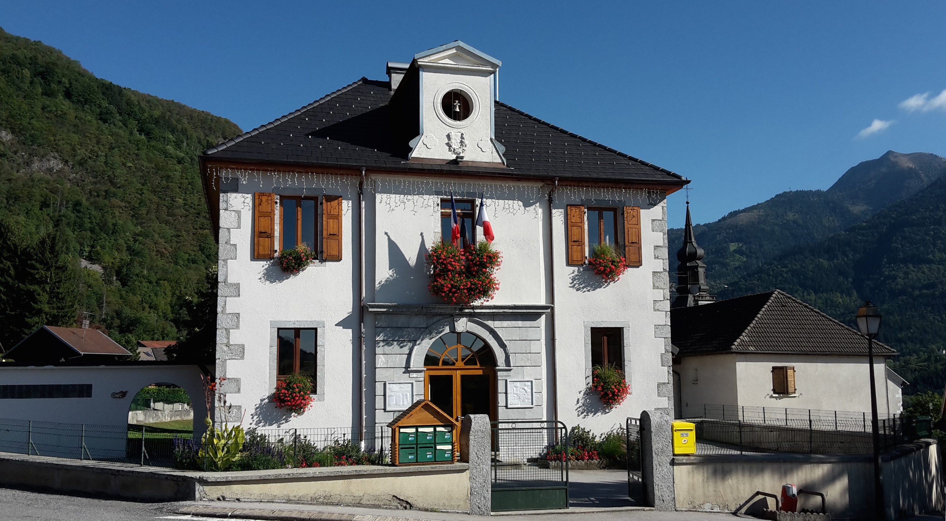 Façade de la mairie de Ville-en-Sallaz en été avec le Môle à droite et le sommet du clocher de l'église de la commune.